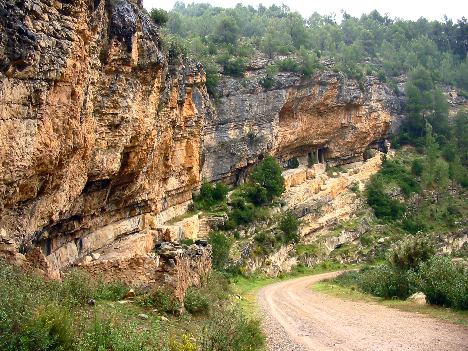 Pinturas rupestres, camino de Arquela, Tuéjar (Valencia, España)